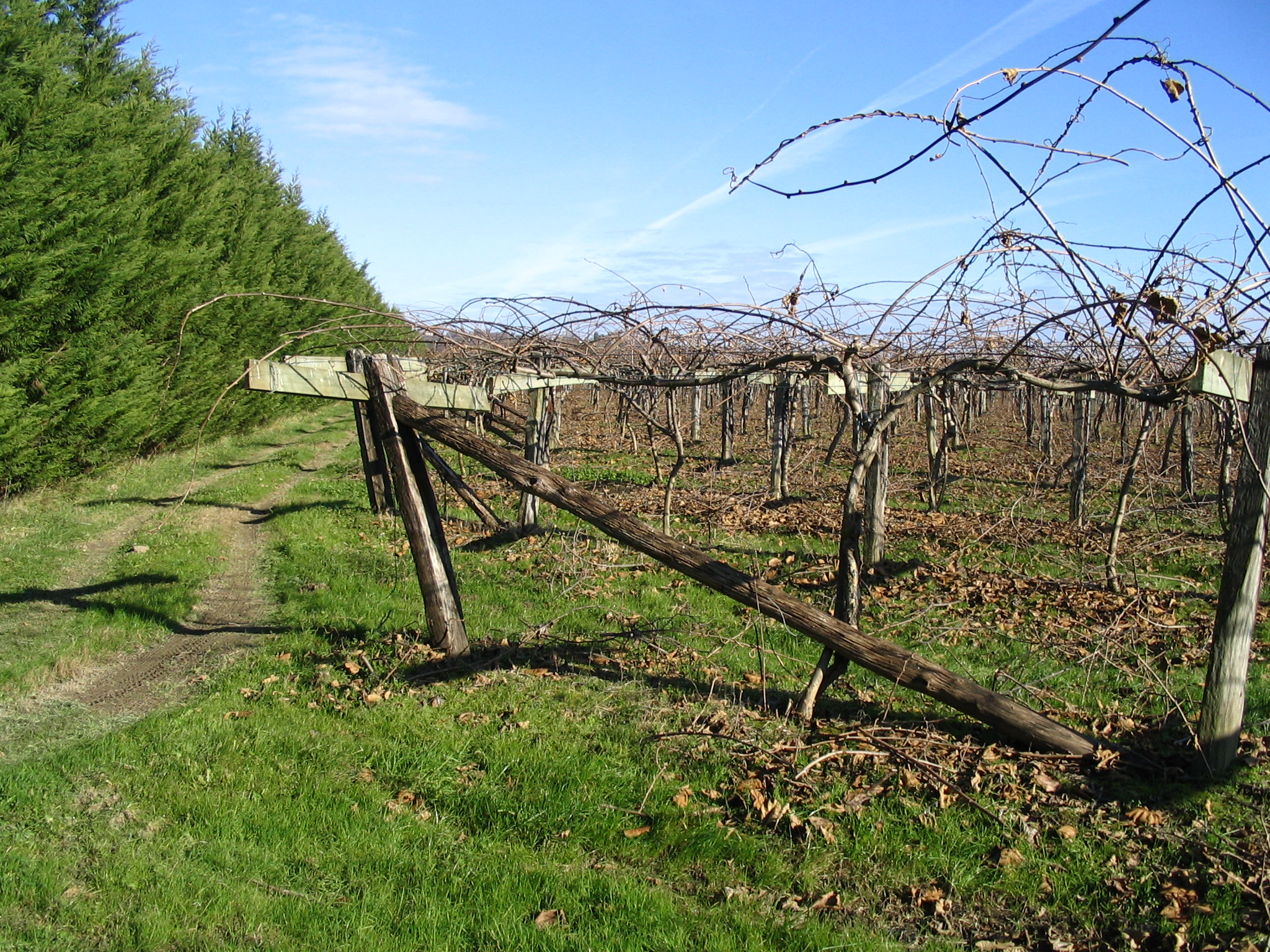 Culture de kiwis dans le sud des landes - France auteur/author: P Charpiat - 2006